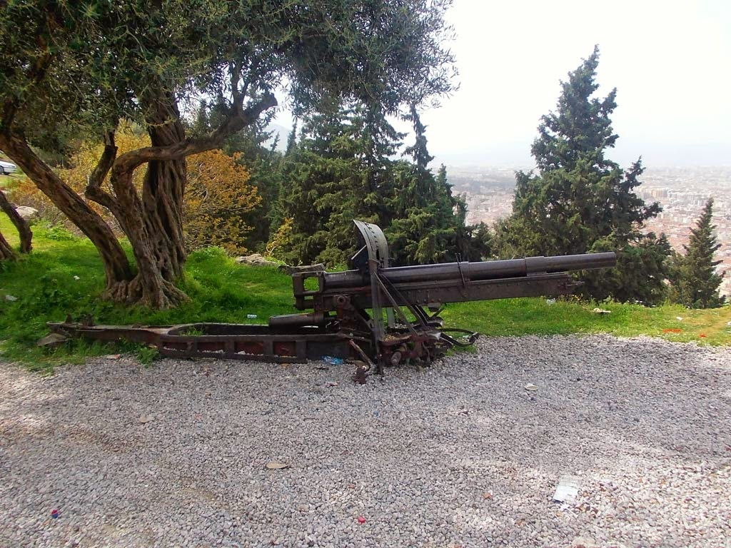 Tarzan Topkale'deki Gerçek Top - Nisan 2014